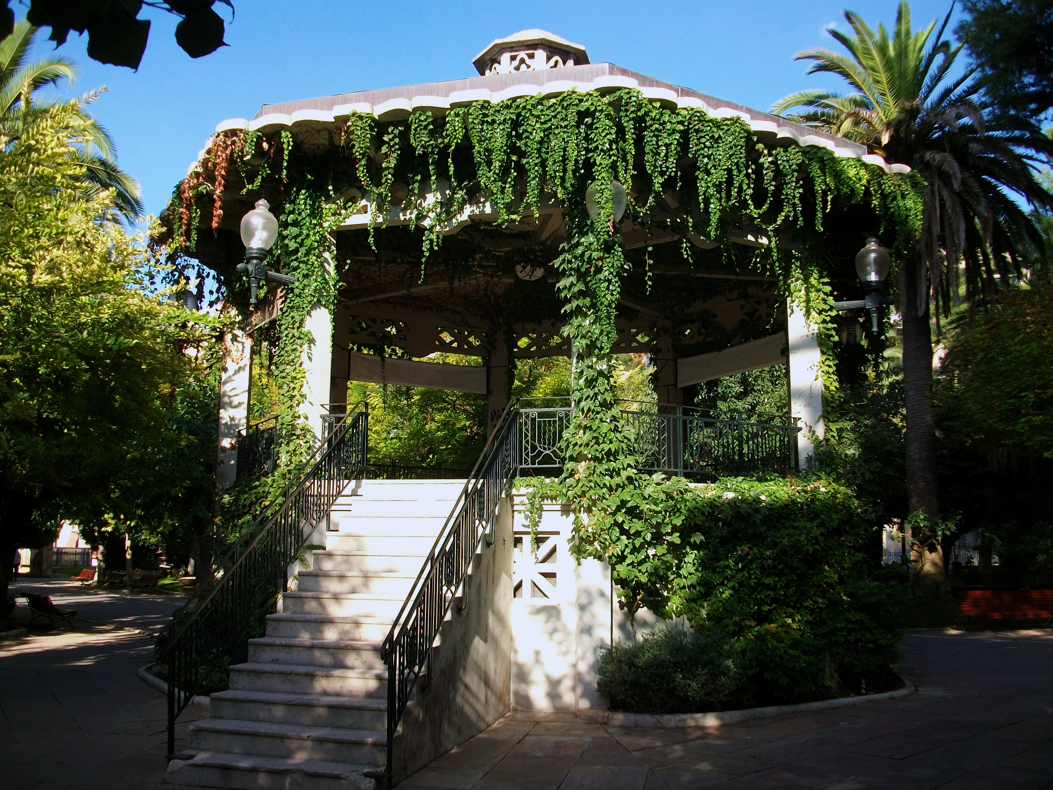 Templet del parc de la Glorieta d'Alcoi.